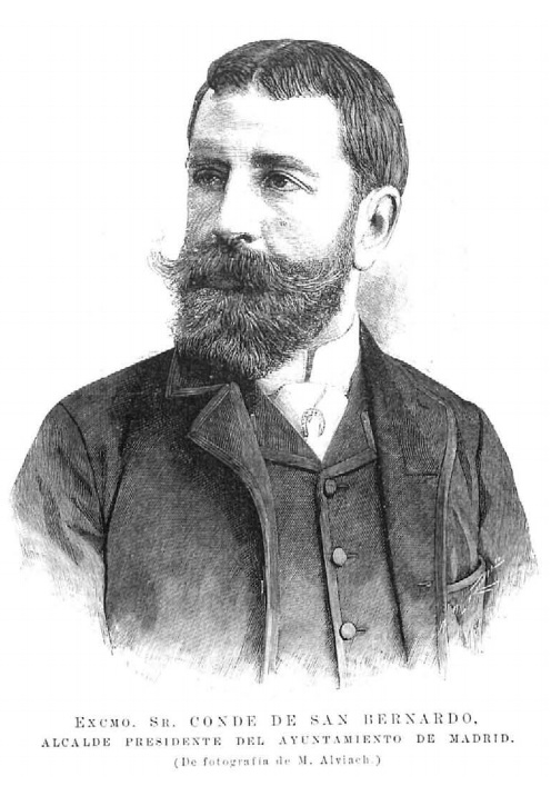 Grabado de Manuel Mariátegui y Vinyals, conde de san Bernardo, de fotografía de Manuel Alviach